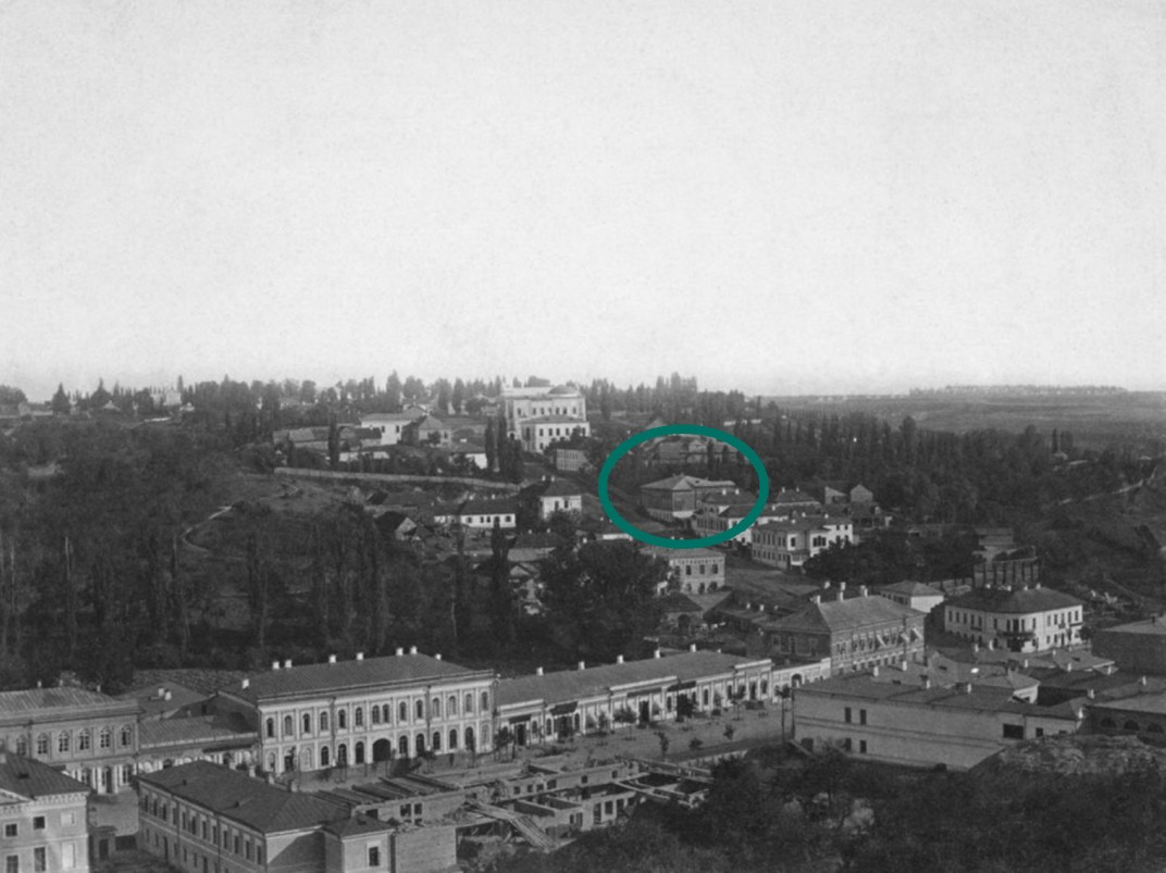 Перша будівля Медичного факультету Університету Св. Володимира.